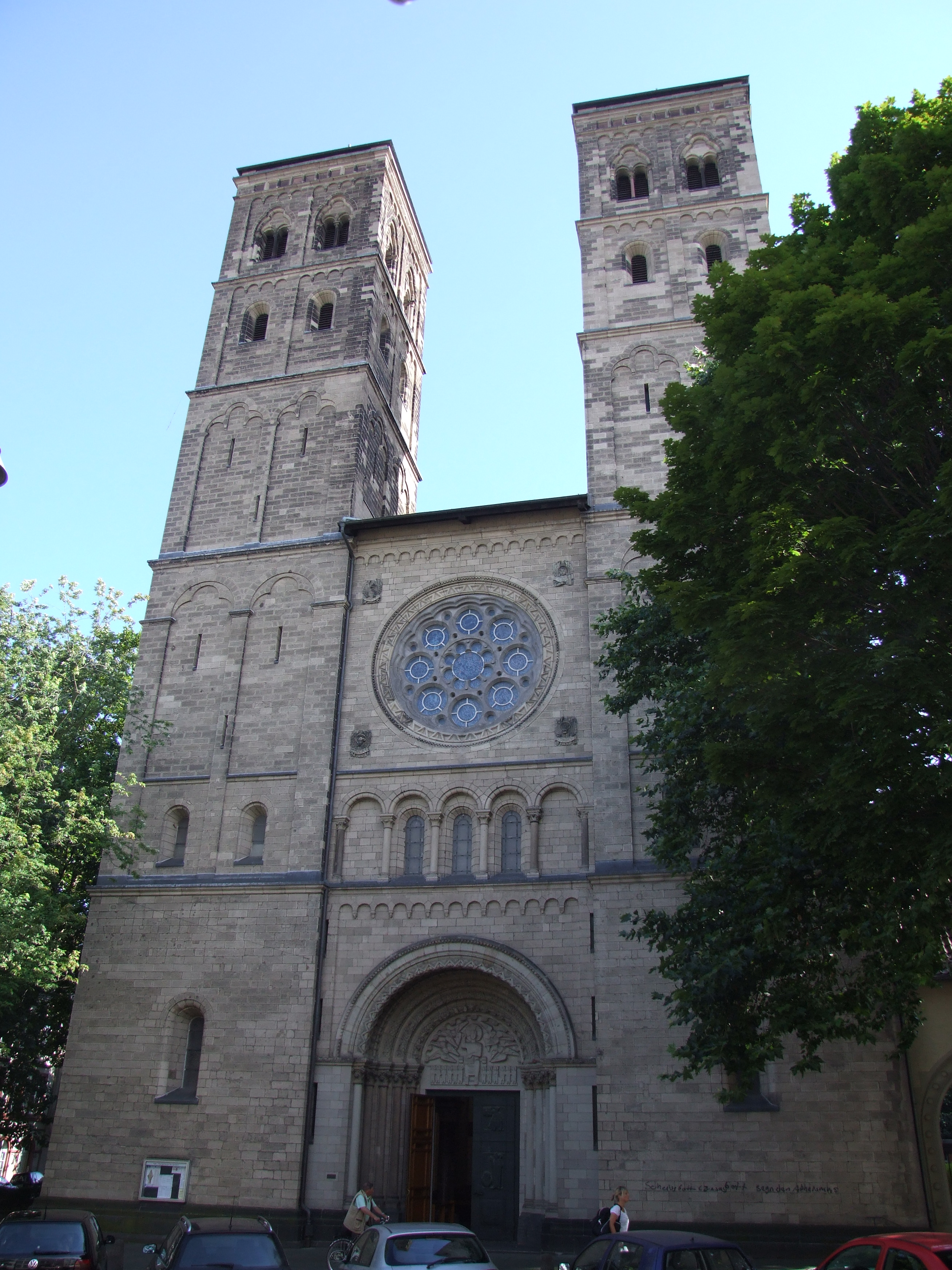 Neu St. Heribert